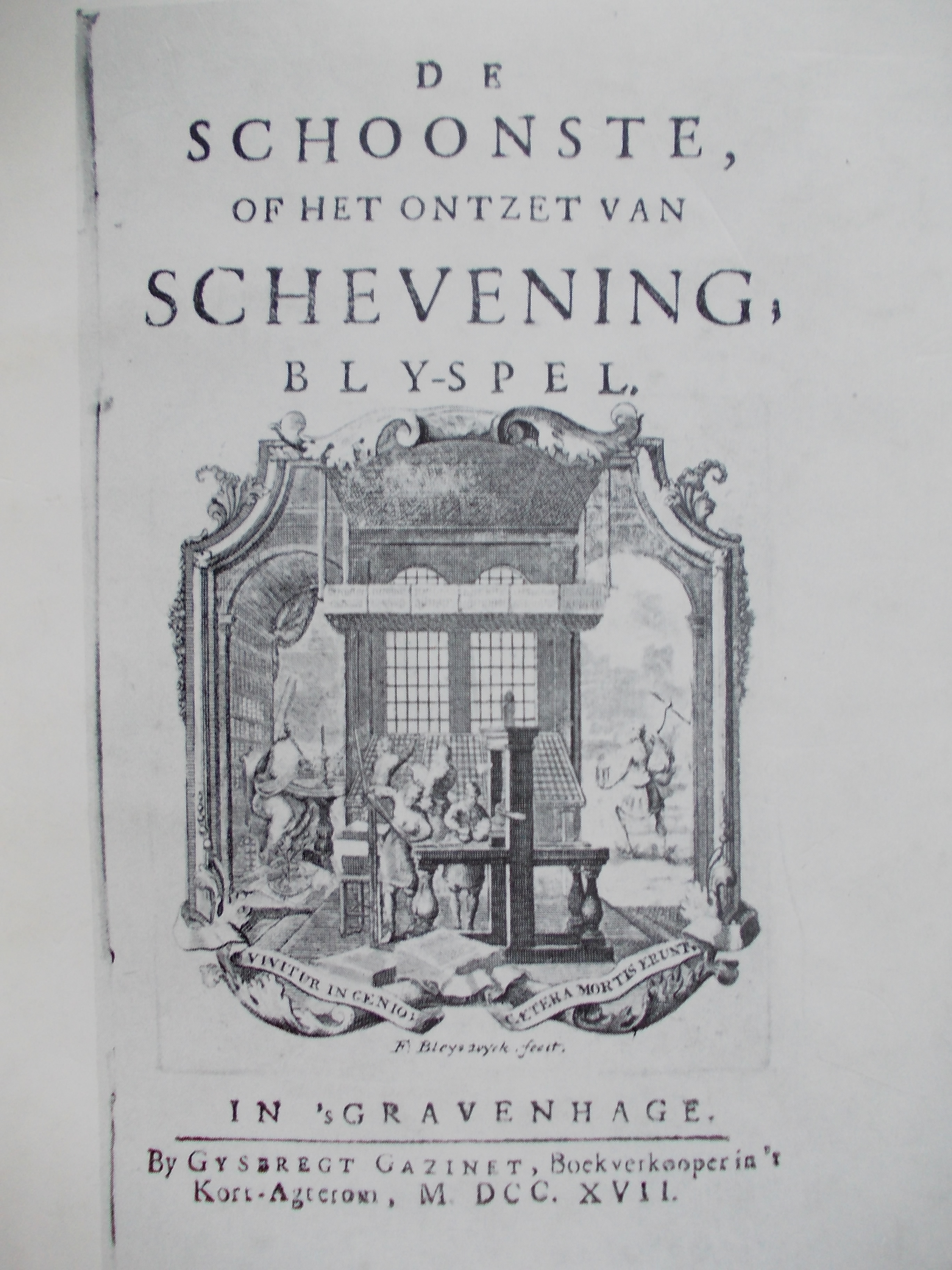 Picture of a cover of book about dialect